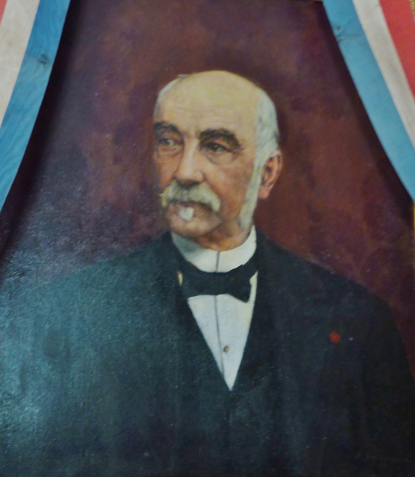 Portrait de Joseph Astor (école française fin XIXème, manoir de Kerazan en Loctudy, fondation Astor)